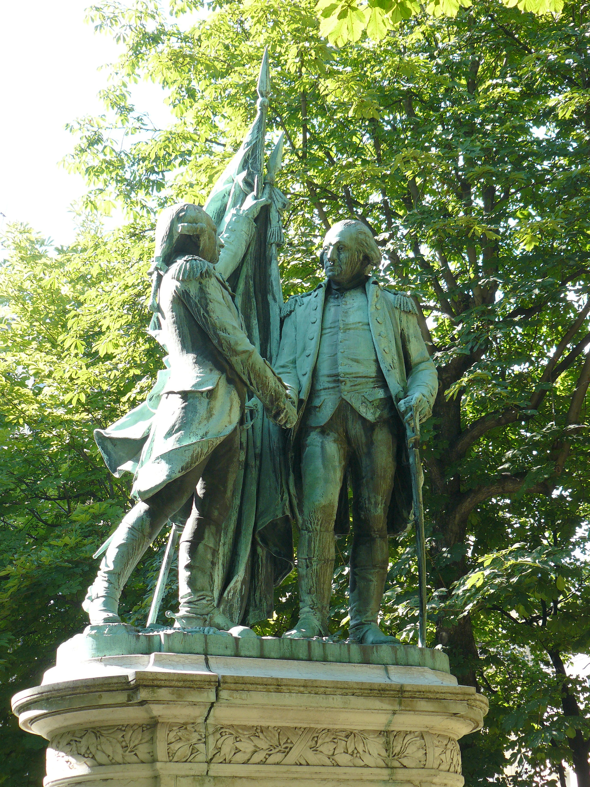 Groupe en bronze de Bartholdi (1890) - sur le socle : « La Fayette et Washington Hommage à la France en reconnaissance de son généreux concours dans la lutte du peuple des États-Unis pour l'indépendance et la liberté » En haut du square des États-Unis, Paris (16e arrond.)